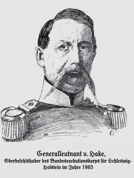 Heinrich Gustav von Hake